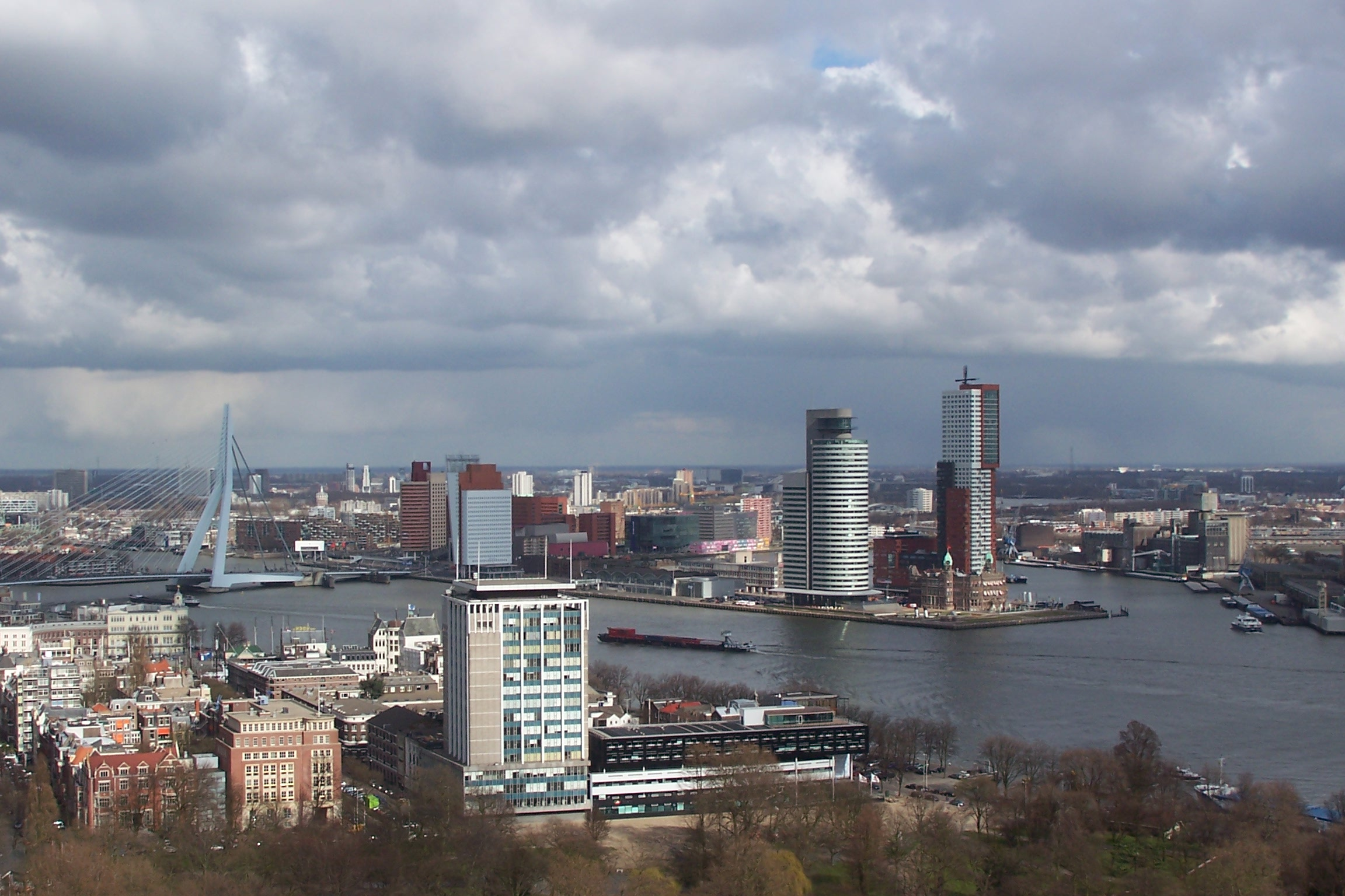 Eigen werk, vanaf Euromast, 10-04-2006